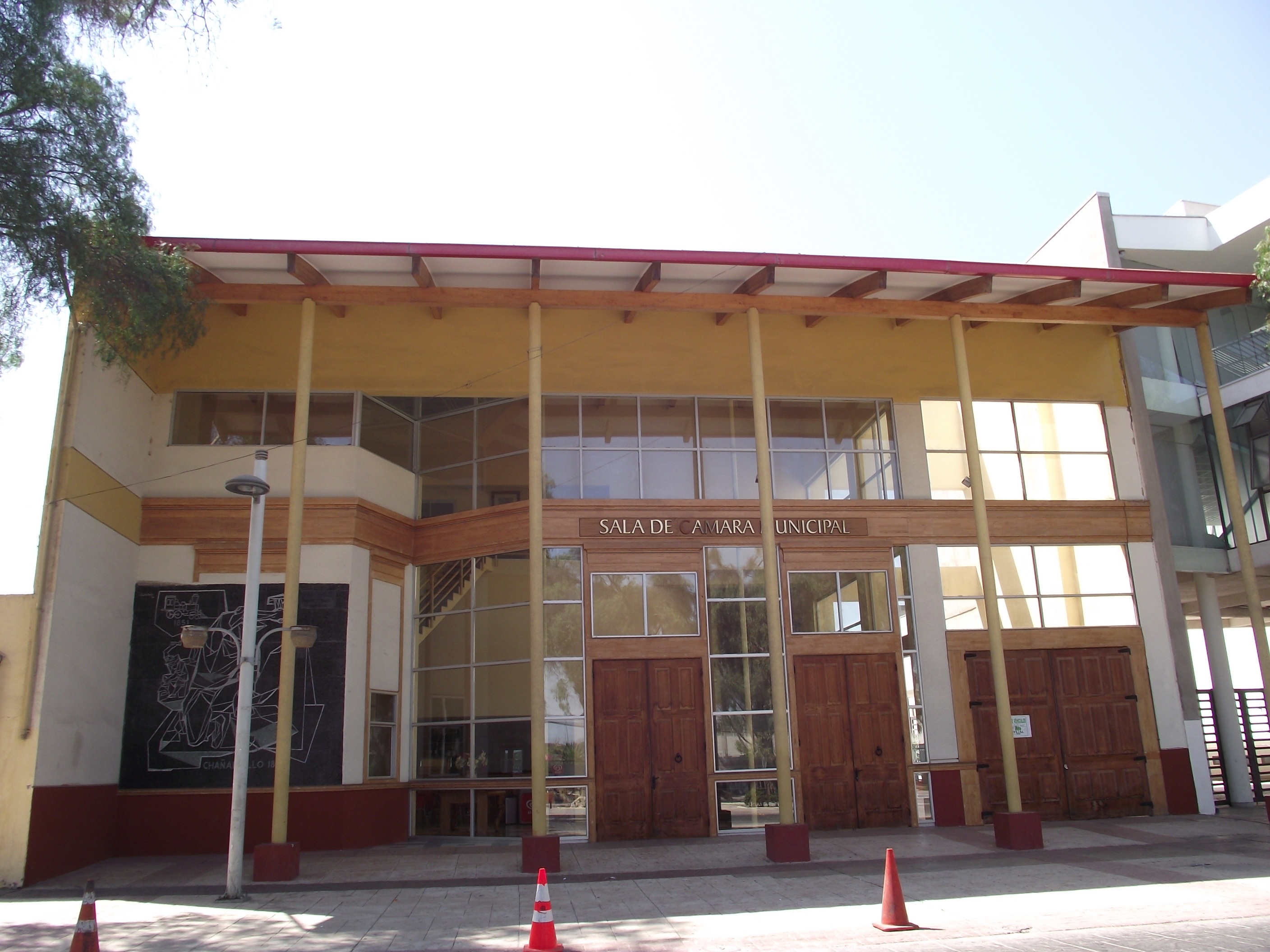 Sala de Cámara Municipal de Copiapó, Chile